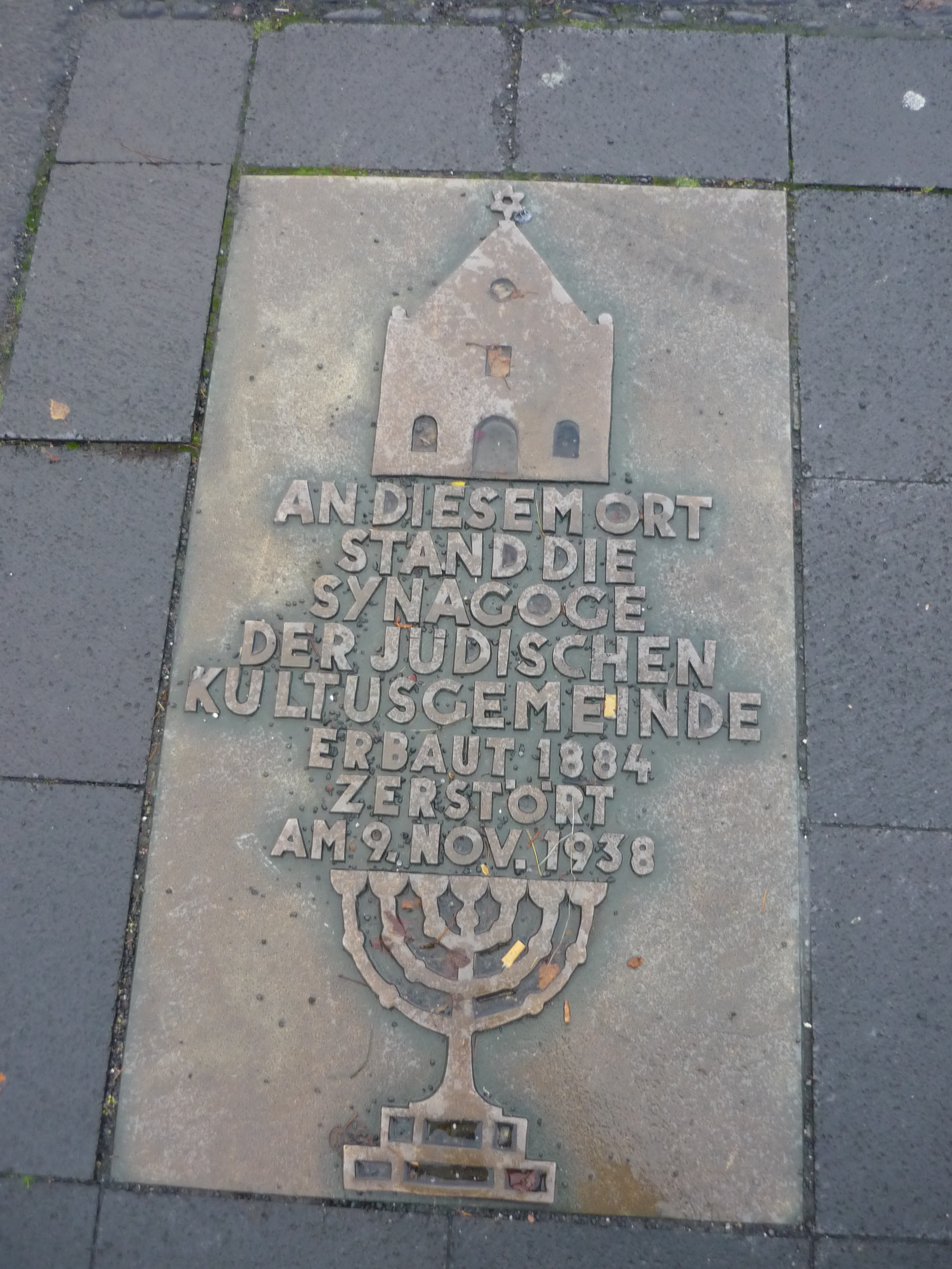 Gedenkstätte Synagoge Altenkirchen (Westerwald), Frankfurter Straße